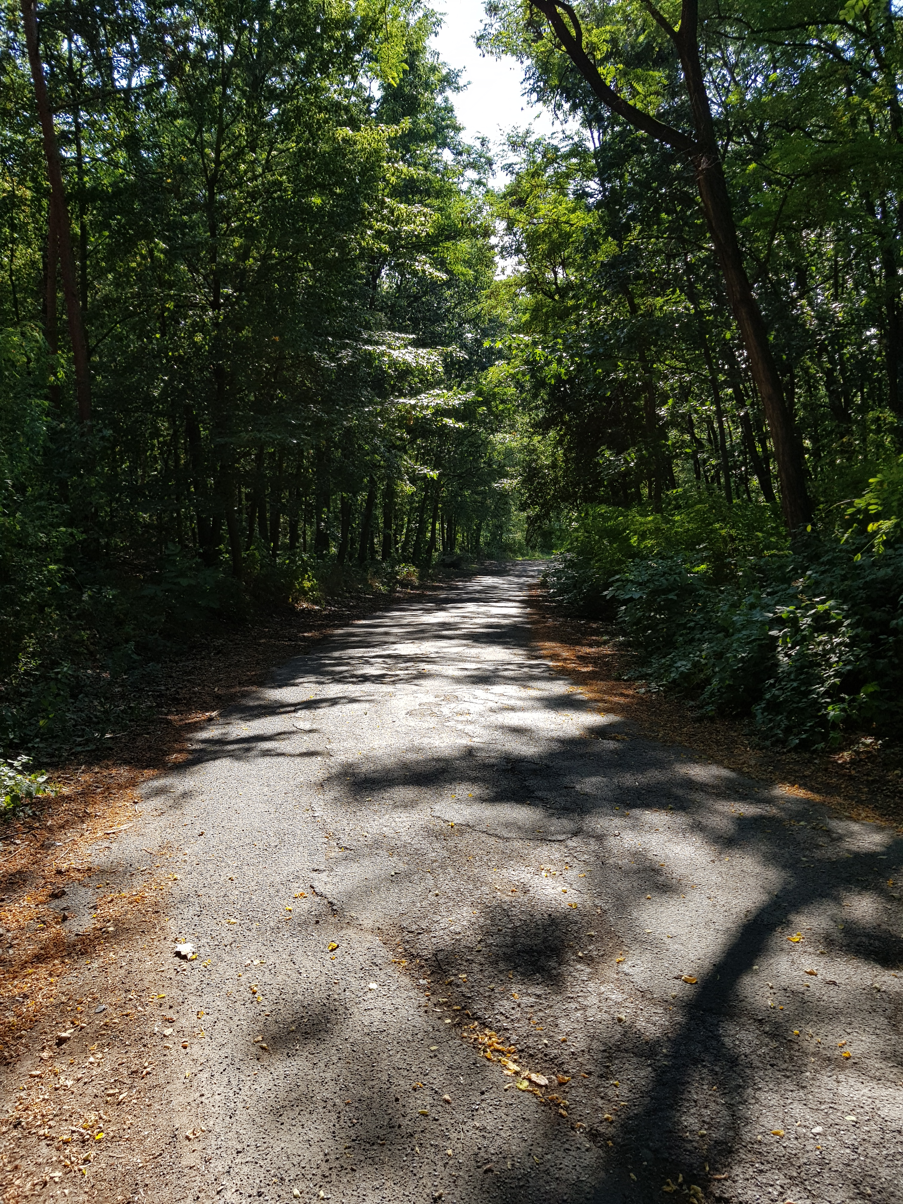 Postřižínská ulice, Praha 14-Hloubětín, pohled z kopce na sever